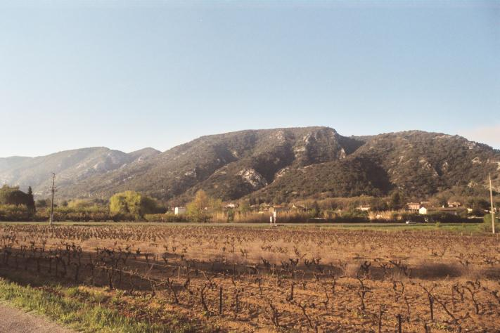 Département de Vaucluse/ Montagne du Luberon/ Vue du plan de Robion/ Photo personnelle prise en 2004